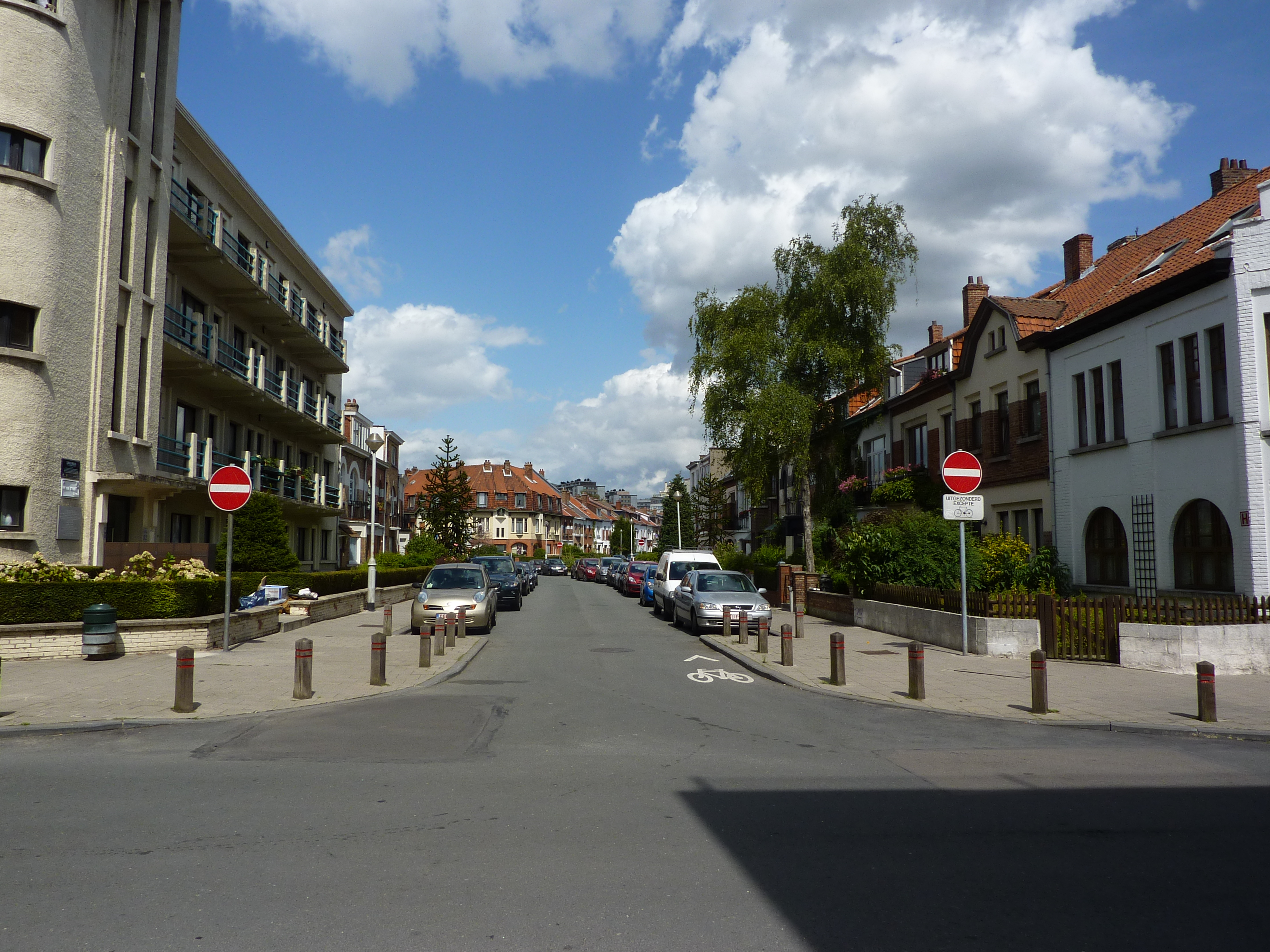 La rue Camille Wollès à Schaerbeek, Bruxelles, Belgique.